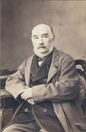 Gian Battista Fabbri